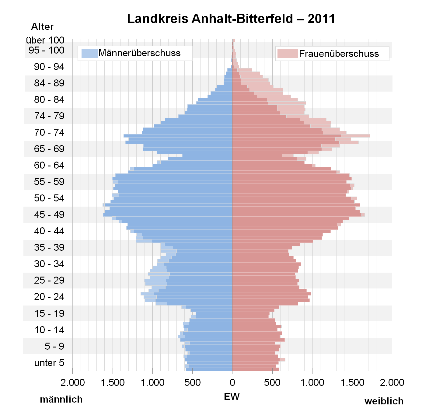 Bevölkerungspyramide des Landkreises Anhalt-Bitterfeld nach Zensus 2011.